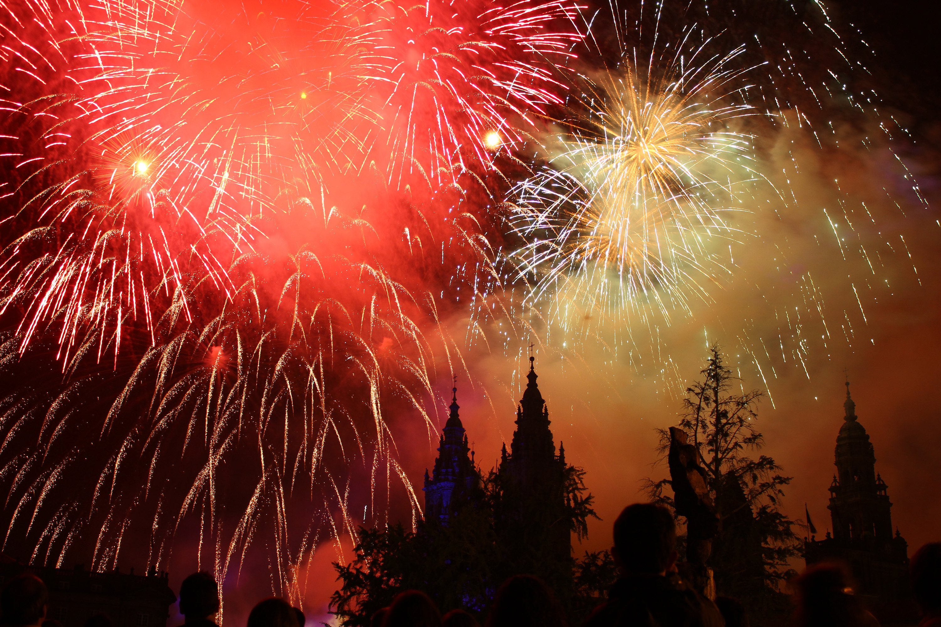 Fuegos artificiales en Santiago de Compostela con motivo del día de Santiago Apóstol, Patrón de Galicia y Patrón de España. Santiago. Apostle's Fireworks 2012 Fireworks in Santiago de Compostela to mark the day of St. James the Apostle, Patron of Galicia and Patron of Spain.